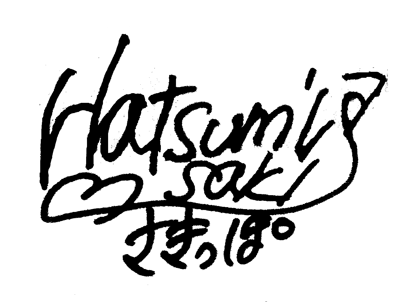 初美沙希署名